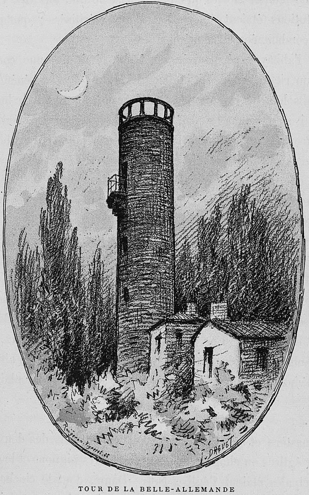 Aux environs de Lyon / Monsieur Josse ; préface de M. Coste-Labaume ; édition illustrée de 250 dessins de J. Drevet.